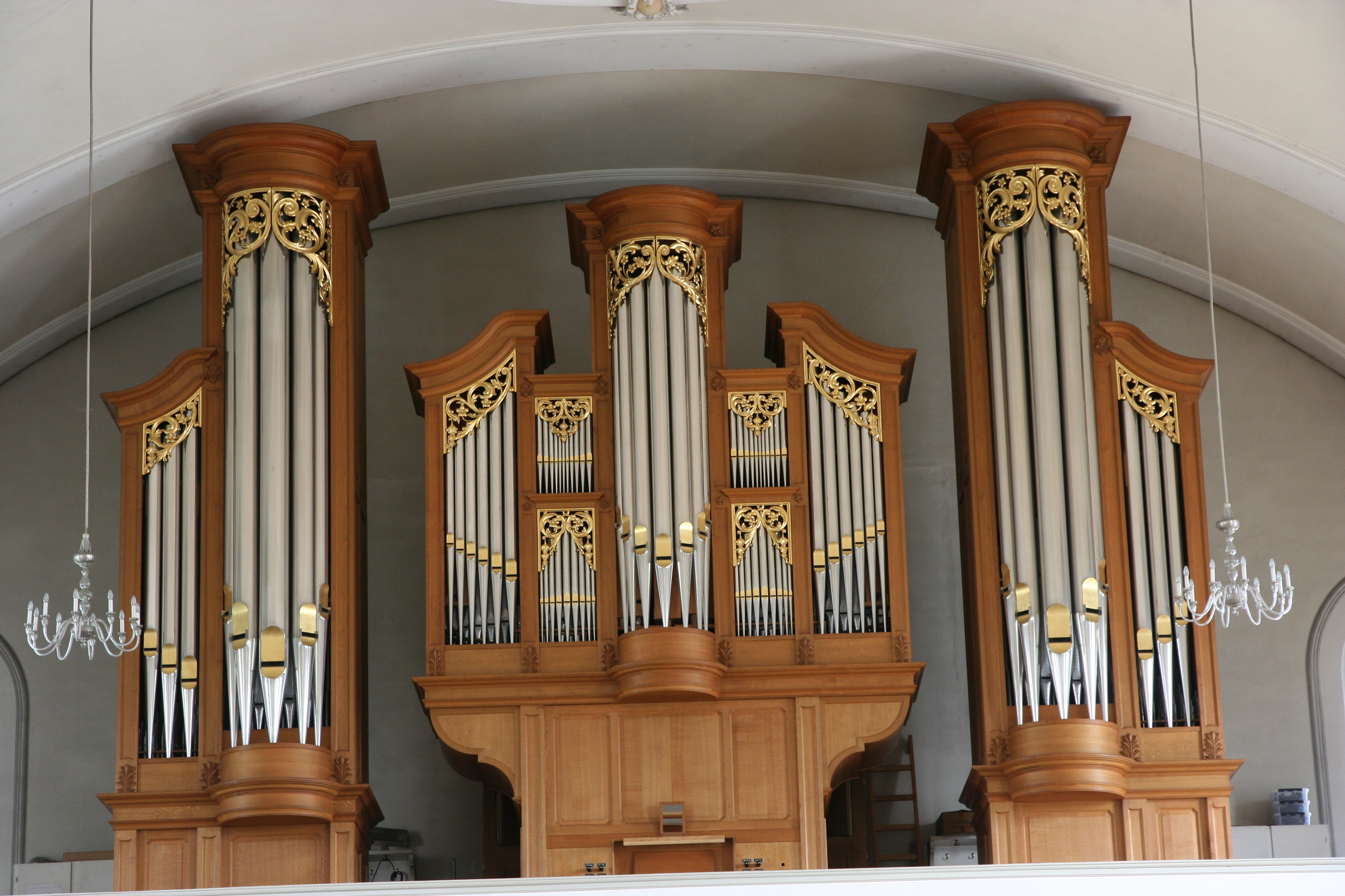 Römisch-katholische Pfarrkirche St. Felix und Regula Thalwil